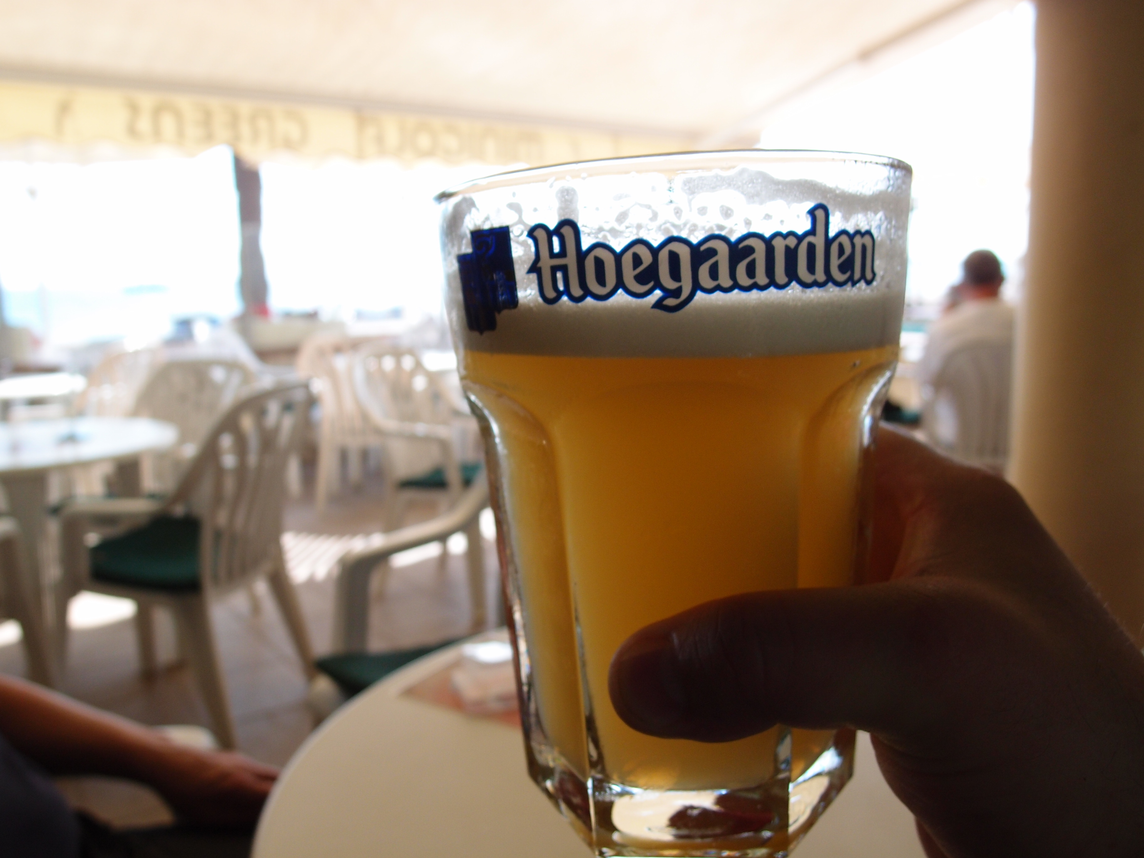 Hoegaarden (belgisches Bier) im 0,5 l Glas Datum: 16.09.2011 Urheber: M. Pfeiffer alias Benutzer:Gordito1869 Quelle: Privates Fotoarchiv des Urhebers